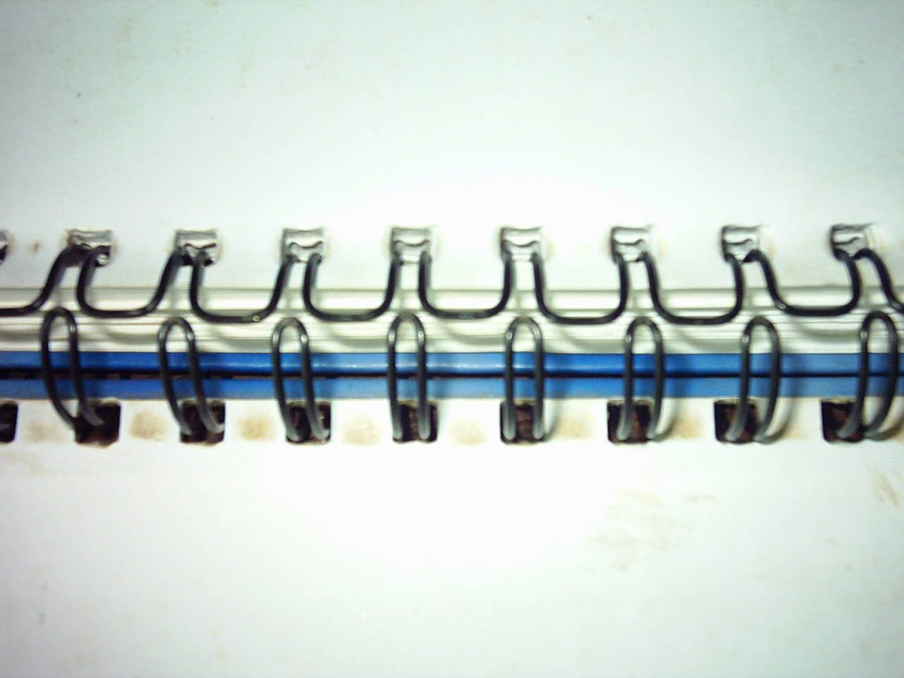 Exemplar encadernado em wire-o